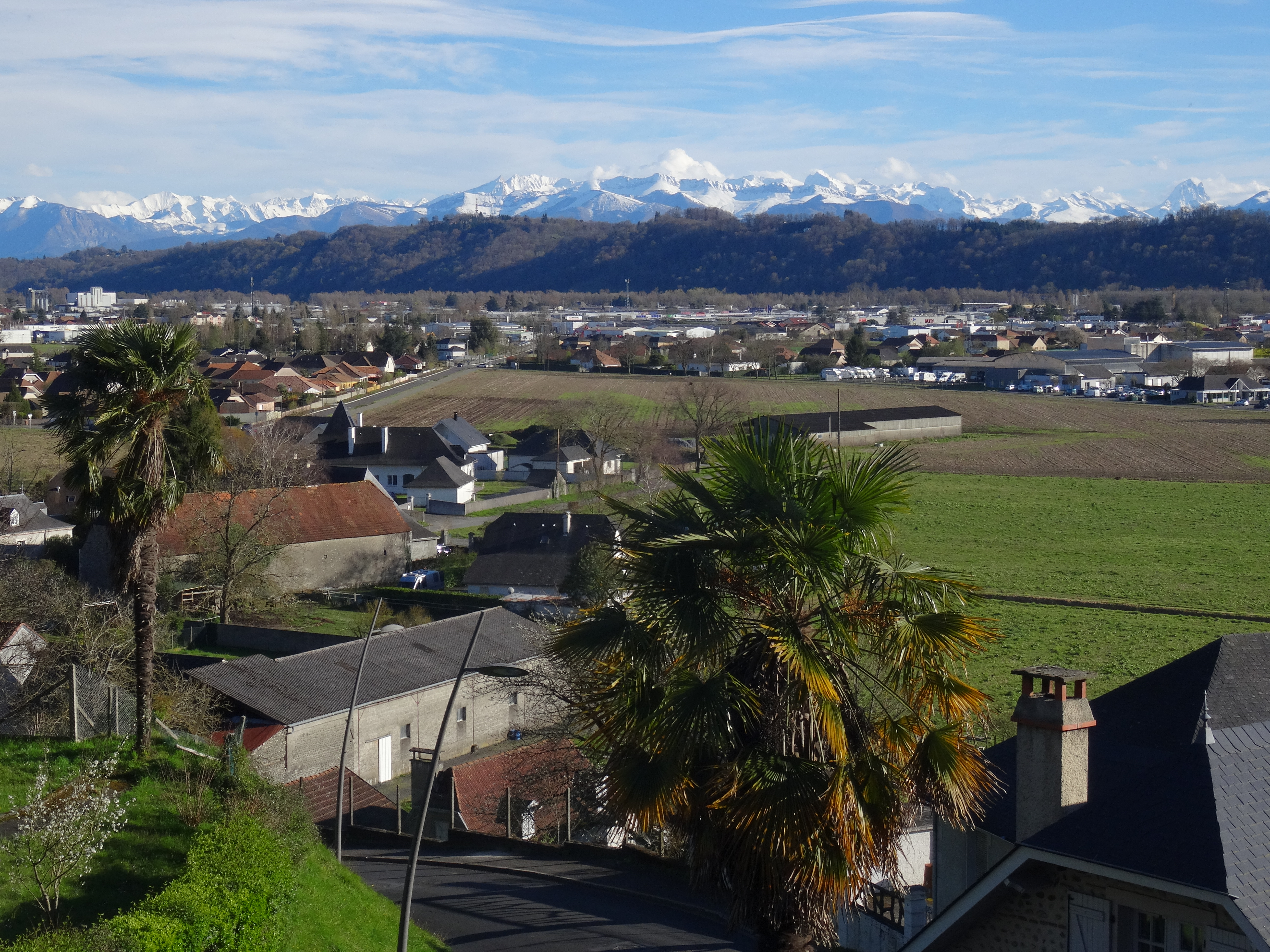 Vue sur la basse-ville de Lescar